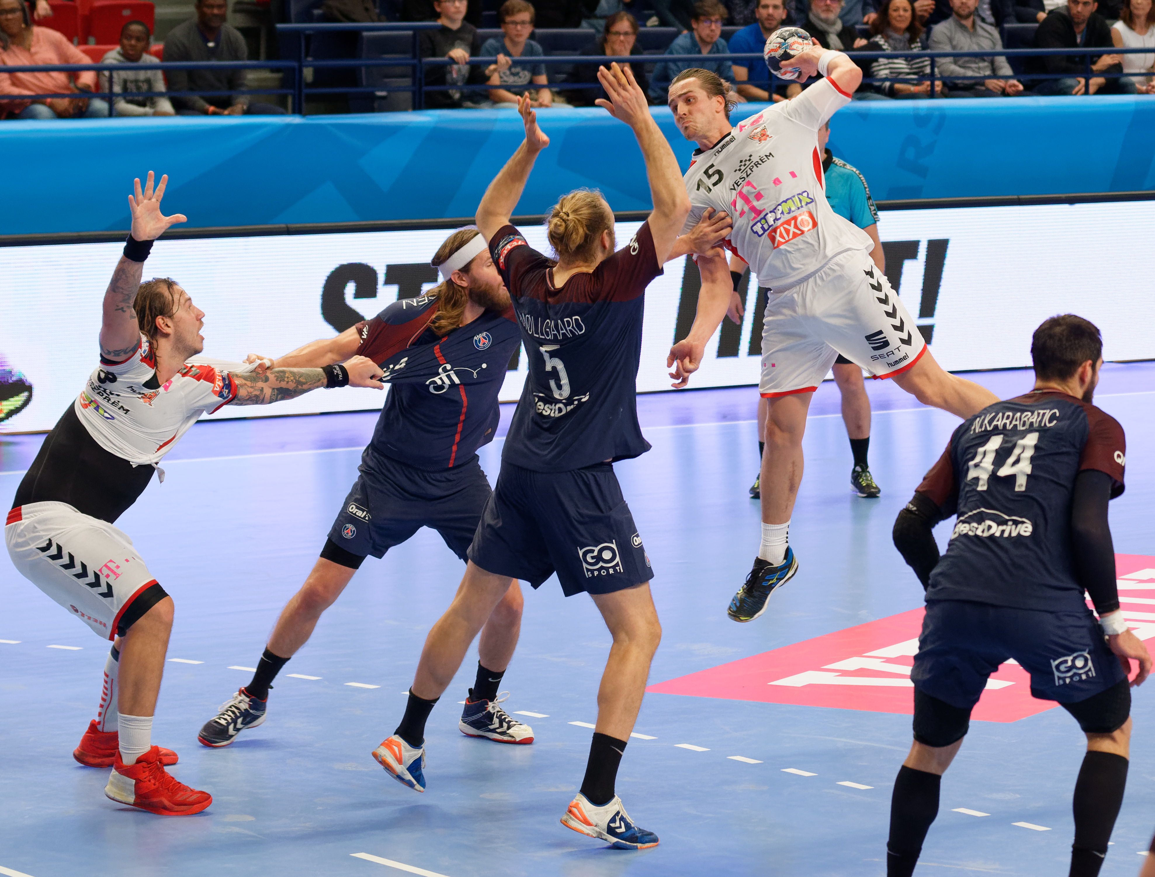 Rencontre de phase de groupe de la ligue des champions 2017/18 entre le PSG et Veszprem. A Coubertin, le 12 novembre 2017.